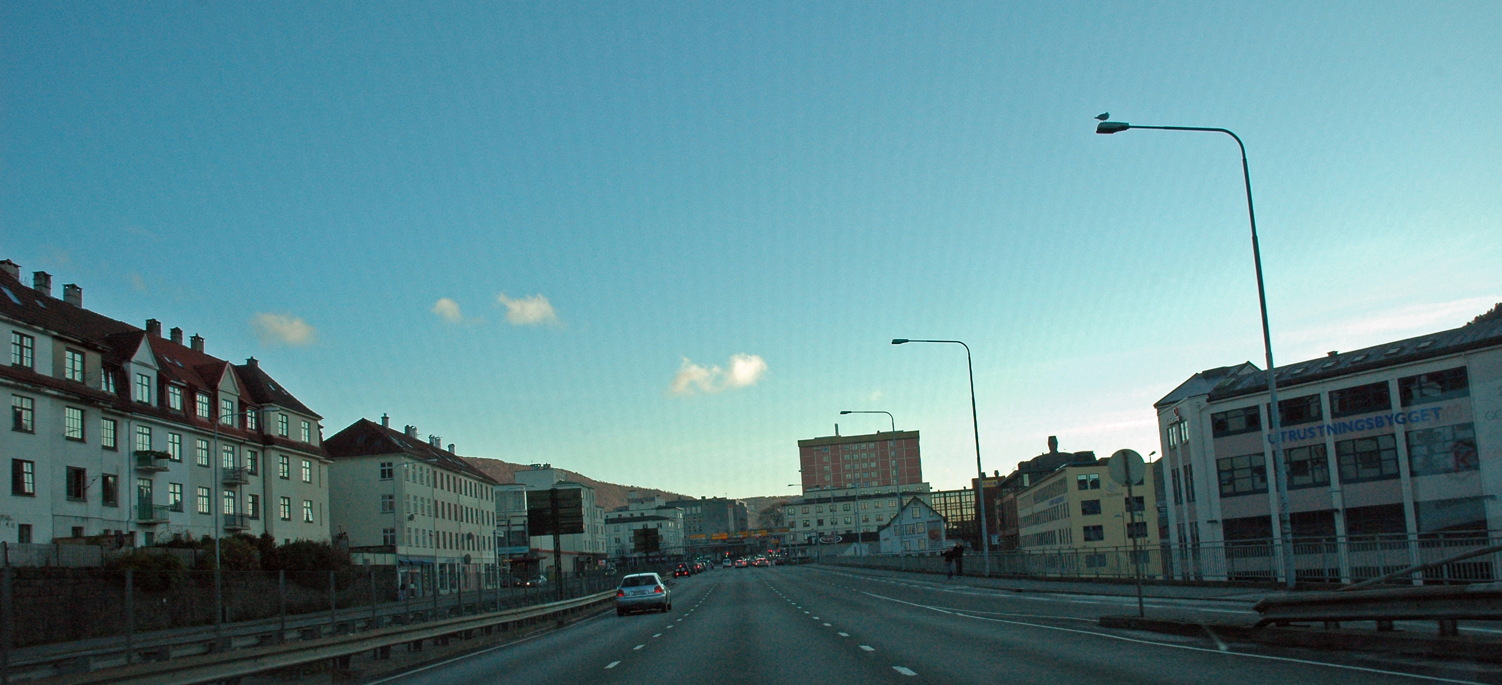 Danmarksplass